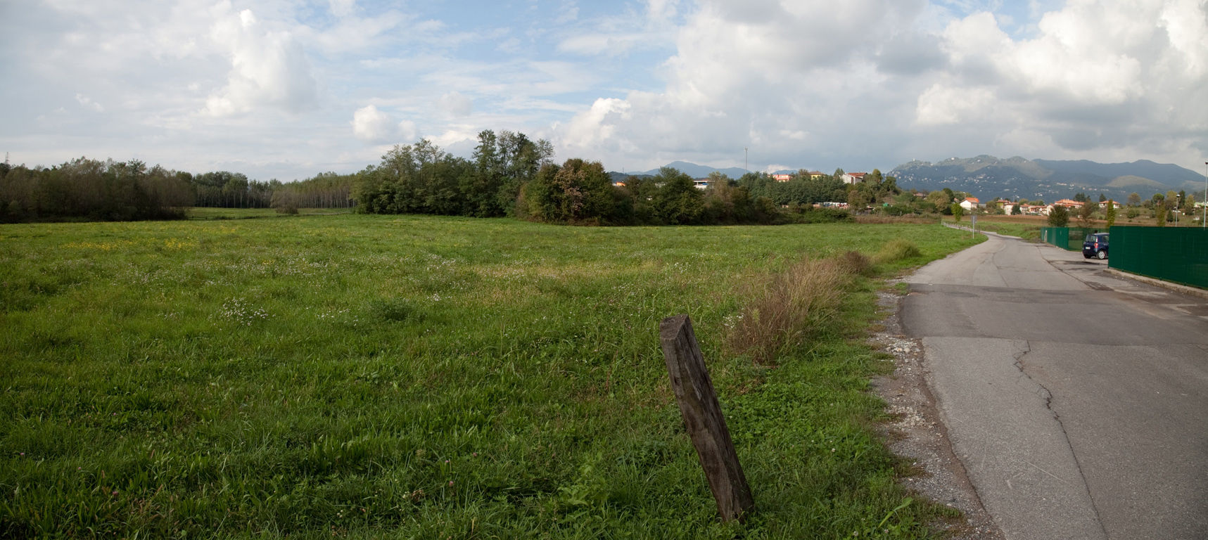 Via alla Guzza 10/2009